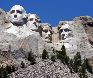 Památník Mount Rushmore v USA